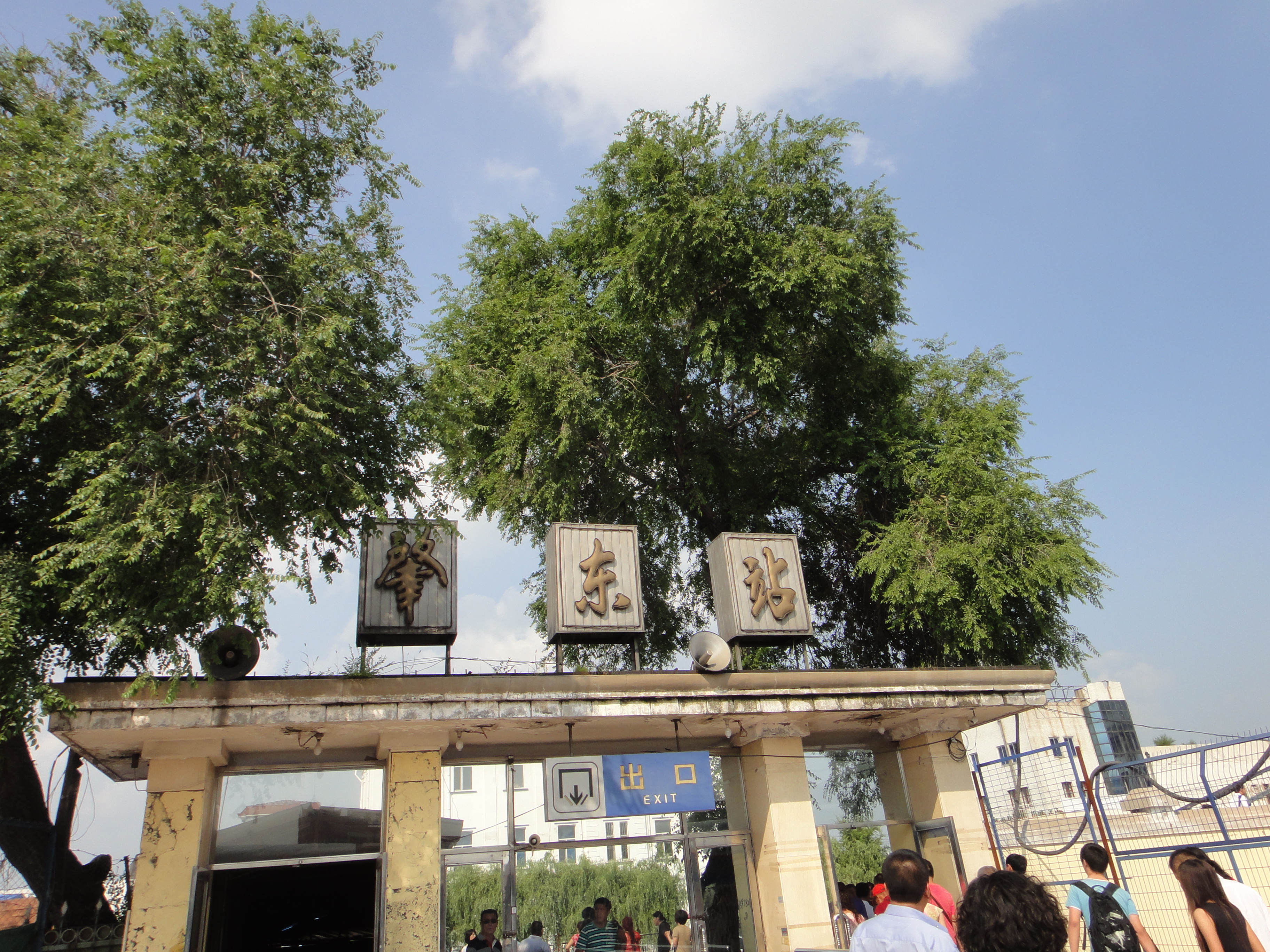 黑龙江省绥化市肇东火车站